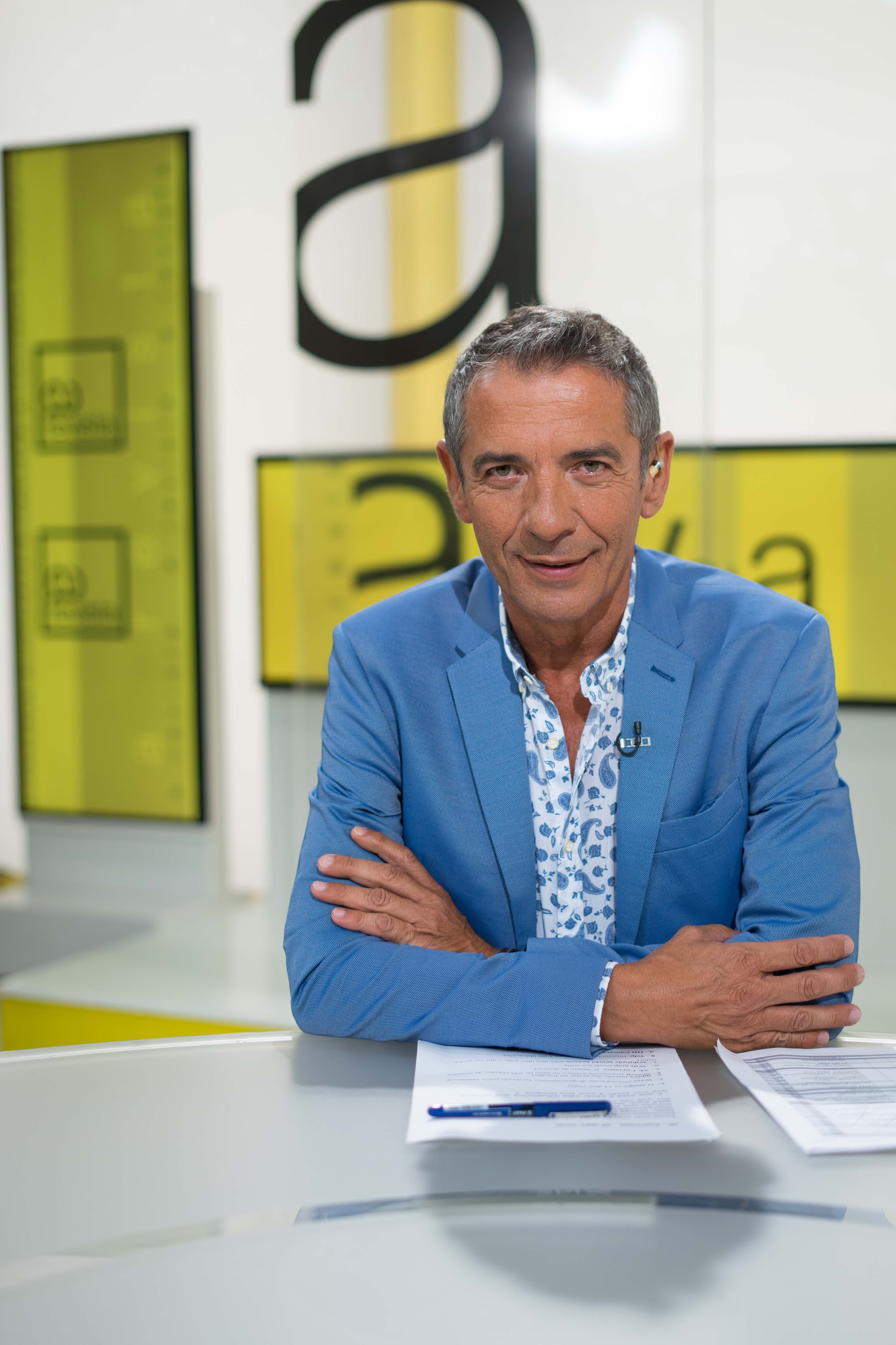 Mon Santiso sentado na mesa do programa A Revista Fin de Semana da TVG